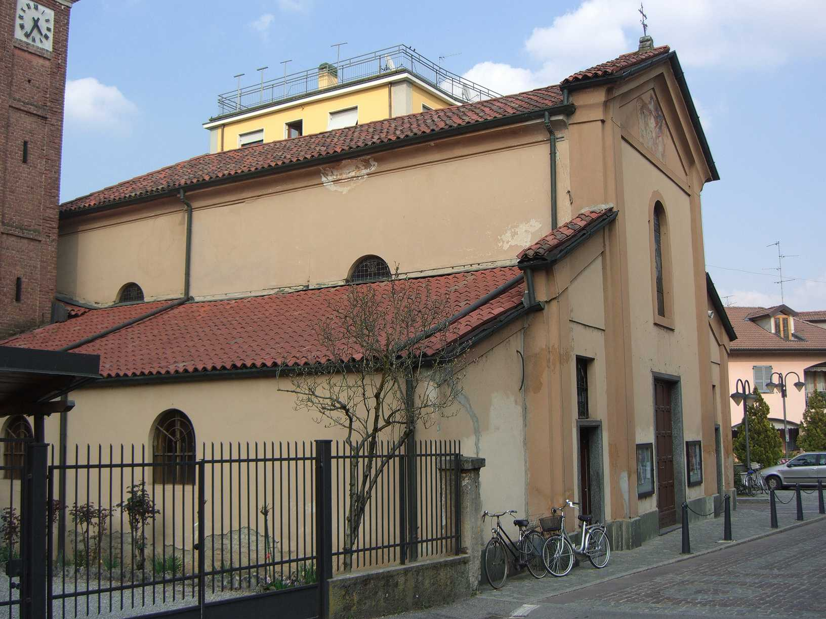 MB Biassono chiesa di San Giorgio nei pressi della porta di ingresso al Parco della Villa Reale di Monza